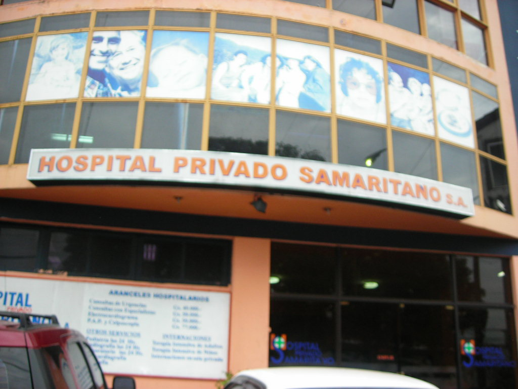 sanatorio